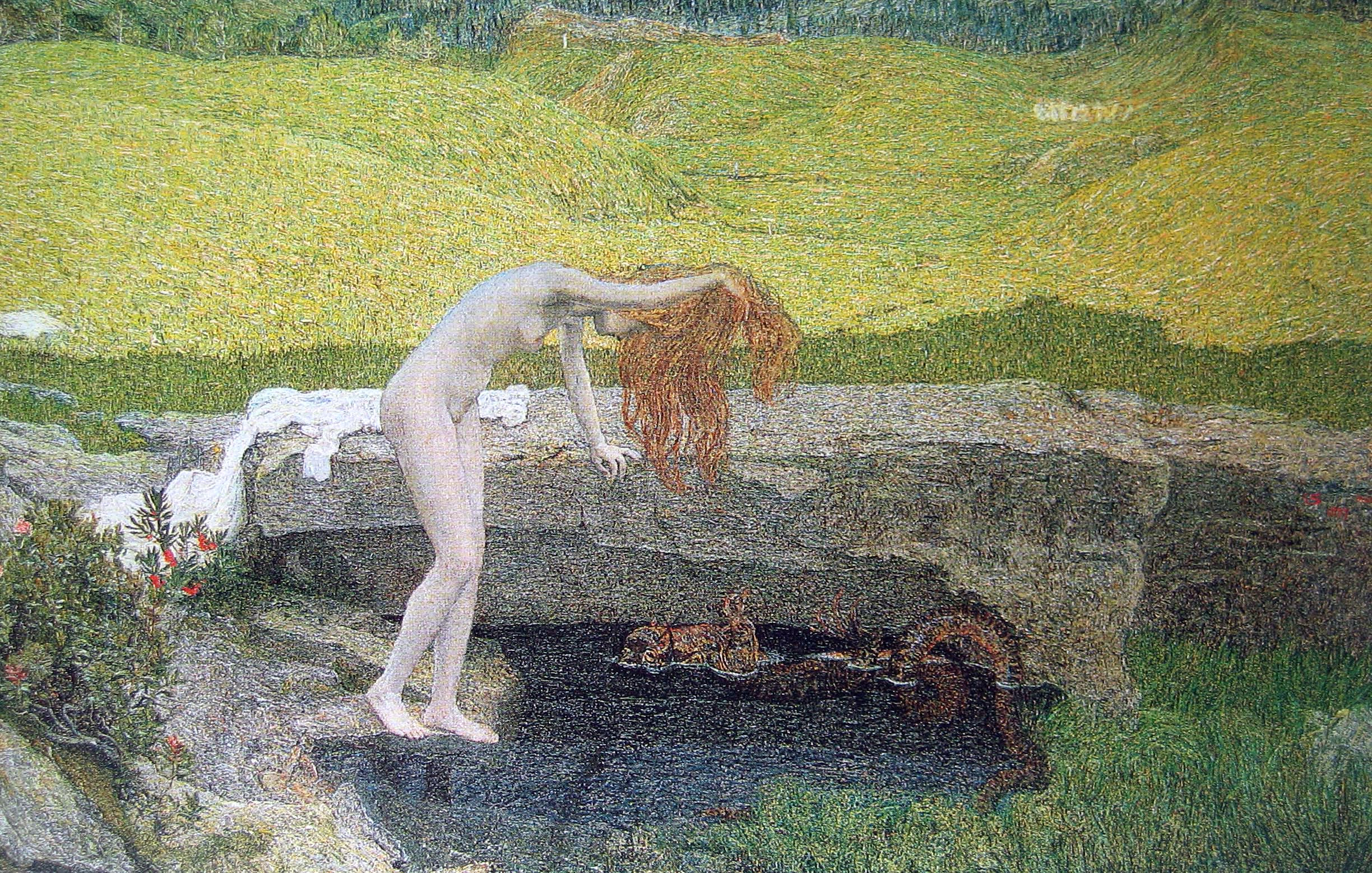 Vanitylabel QS:Len,"Vanity" label QS:Lde,"Eitelkeit"